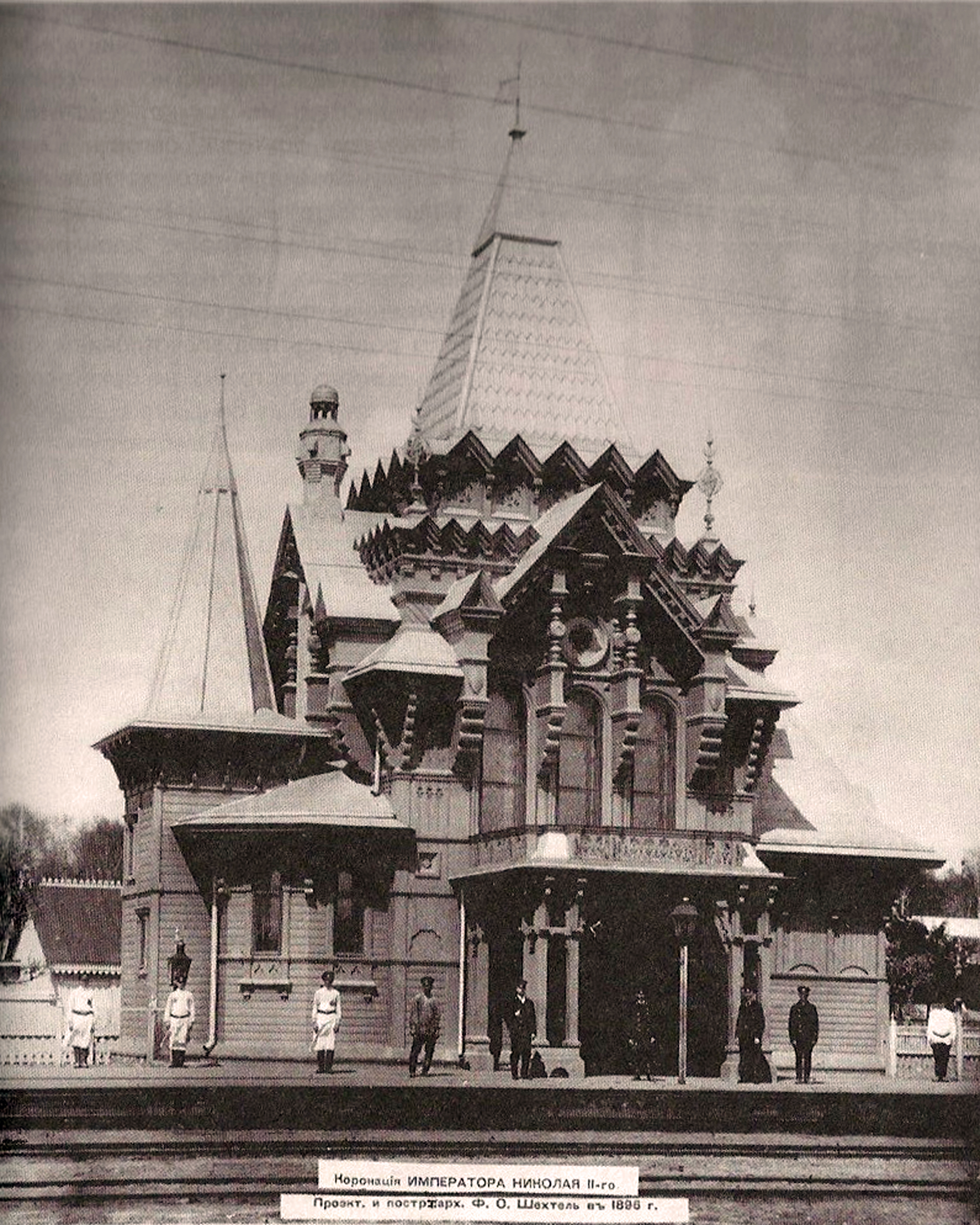 Фёдор Шехтель. Царский павильон на станции Одинцово.